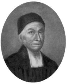 Das Bild zeigt den Lehrer, Theologen, Wanderführer und Schriftsteller Carl Heinrich Nicolai. Nicolai gilt als einer der touristischen Erschließer der Sächsischen Schweiz.